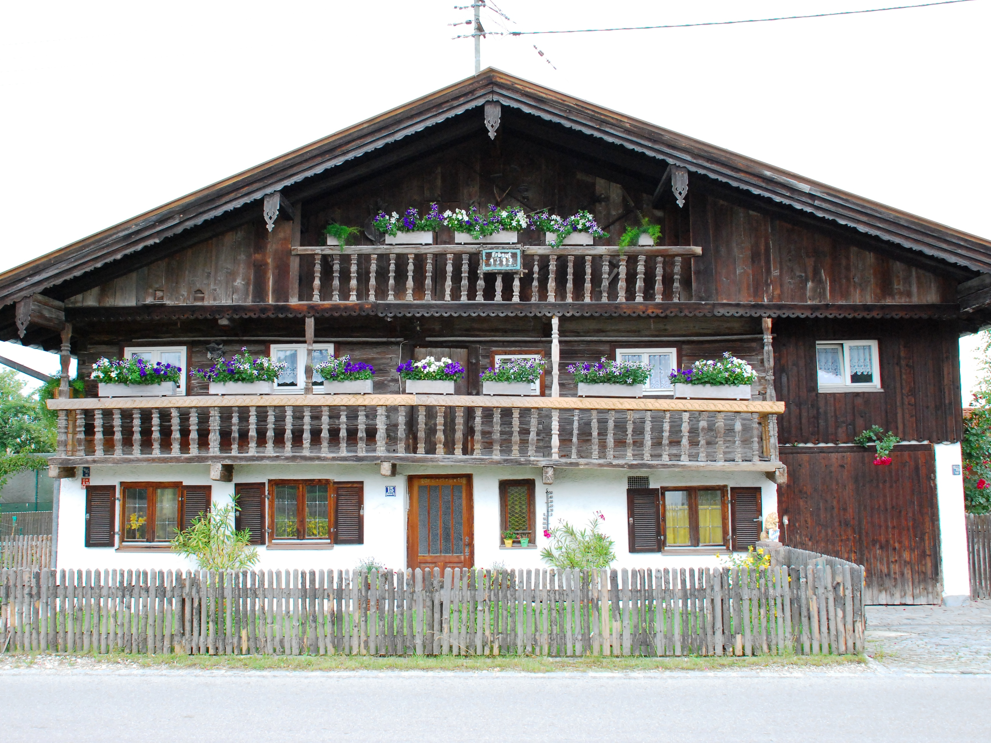 Bauernhaus "Biechl" in der Münchner Straße 15 in Aying, Landkreis München, Bezirk Oberbayern, Bayern. Als Baudenkmal in der Bayerischen Denkmalliste unter Aktennummer D-1-84-137-7 aufgeführt. Laut Denkmalliste Blockbau-Obergeschoss erbaut im Jahr 1583. Foto gemäß den Voraussetzungen zur Panoramafreiheit von öffentlicher Verkehrsfläche aus aufgenommen.